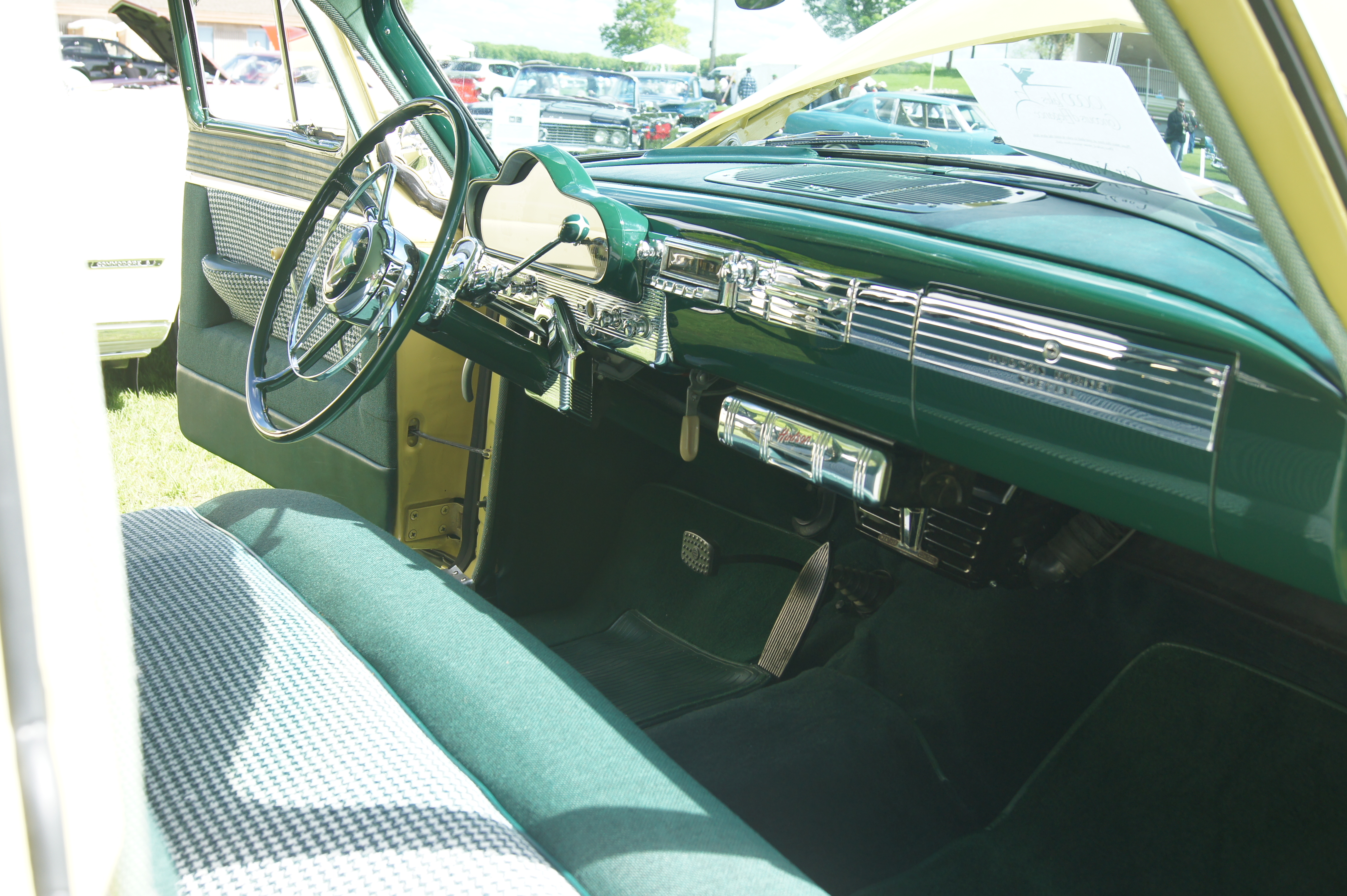 54 Hudson Hornet